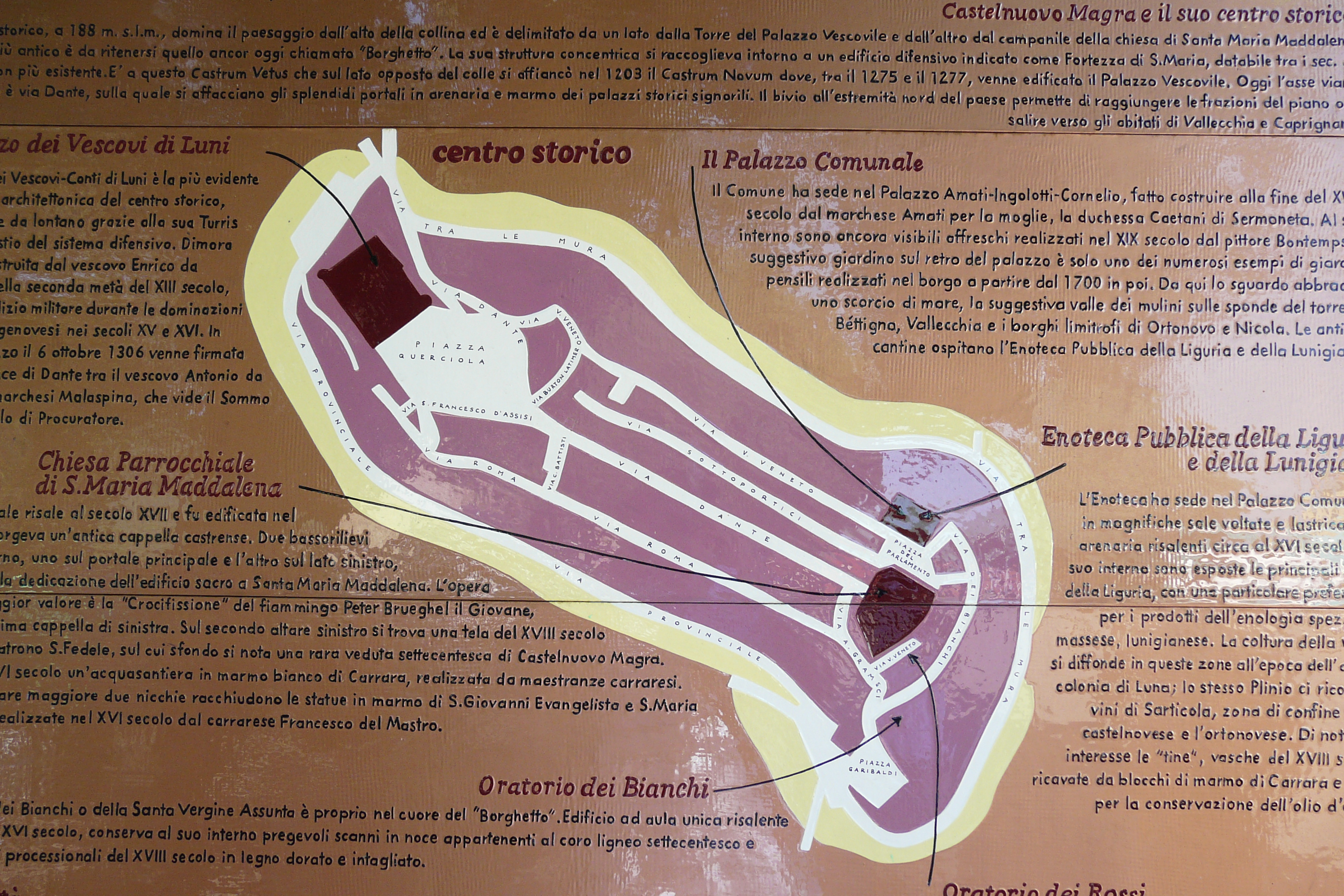 Mappa di Castelnuovo Magra, Liguria, Italia